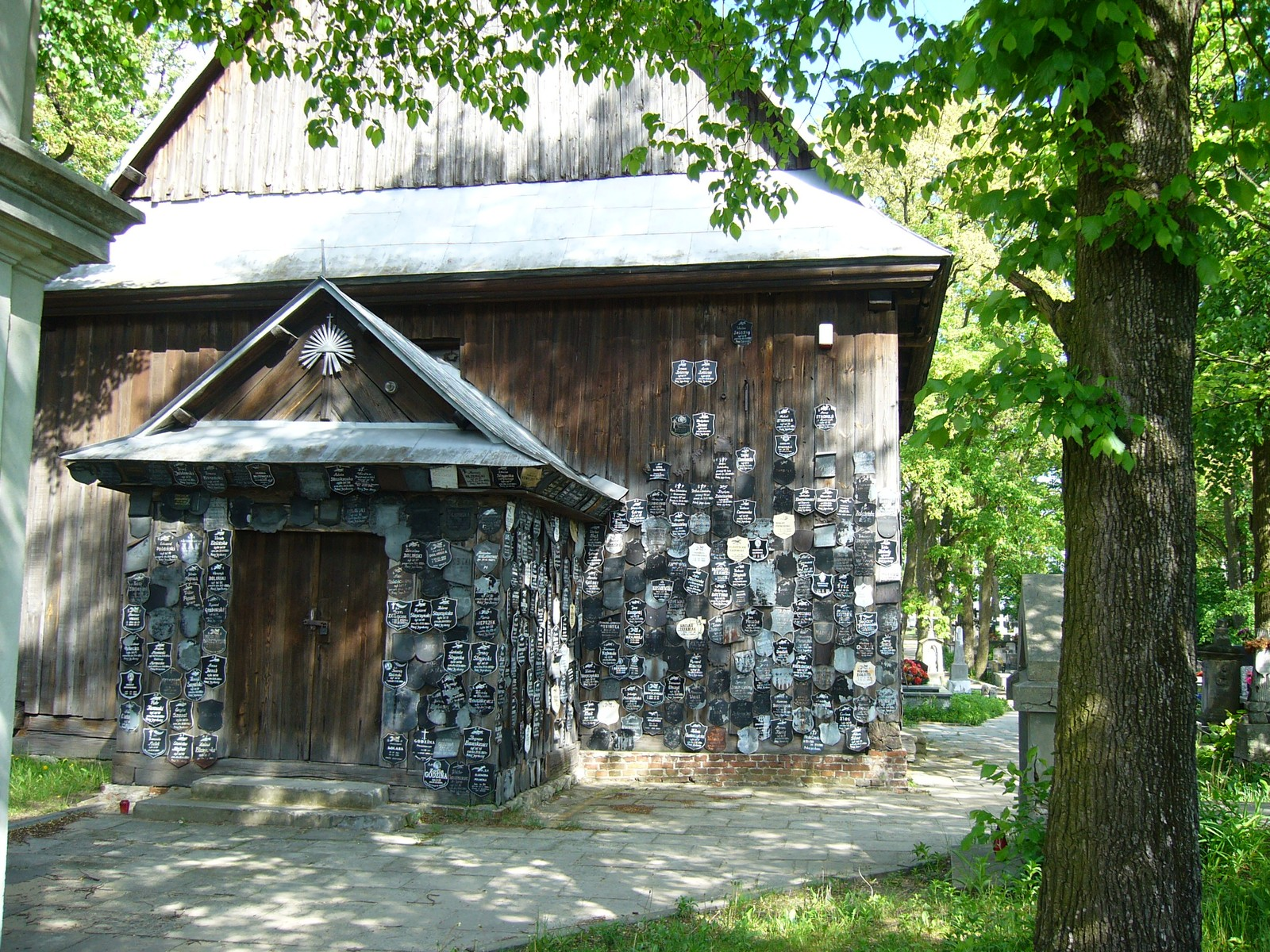 Kościół Św. Anny